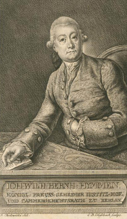 Johann Wilhelm Bernhard von Hymmen (1725-1787), prussian judge